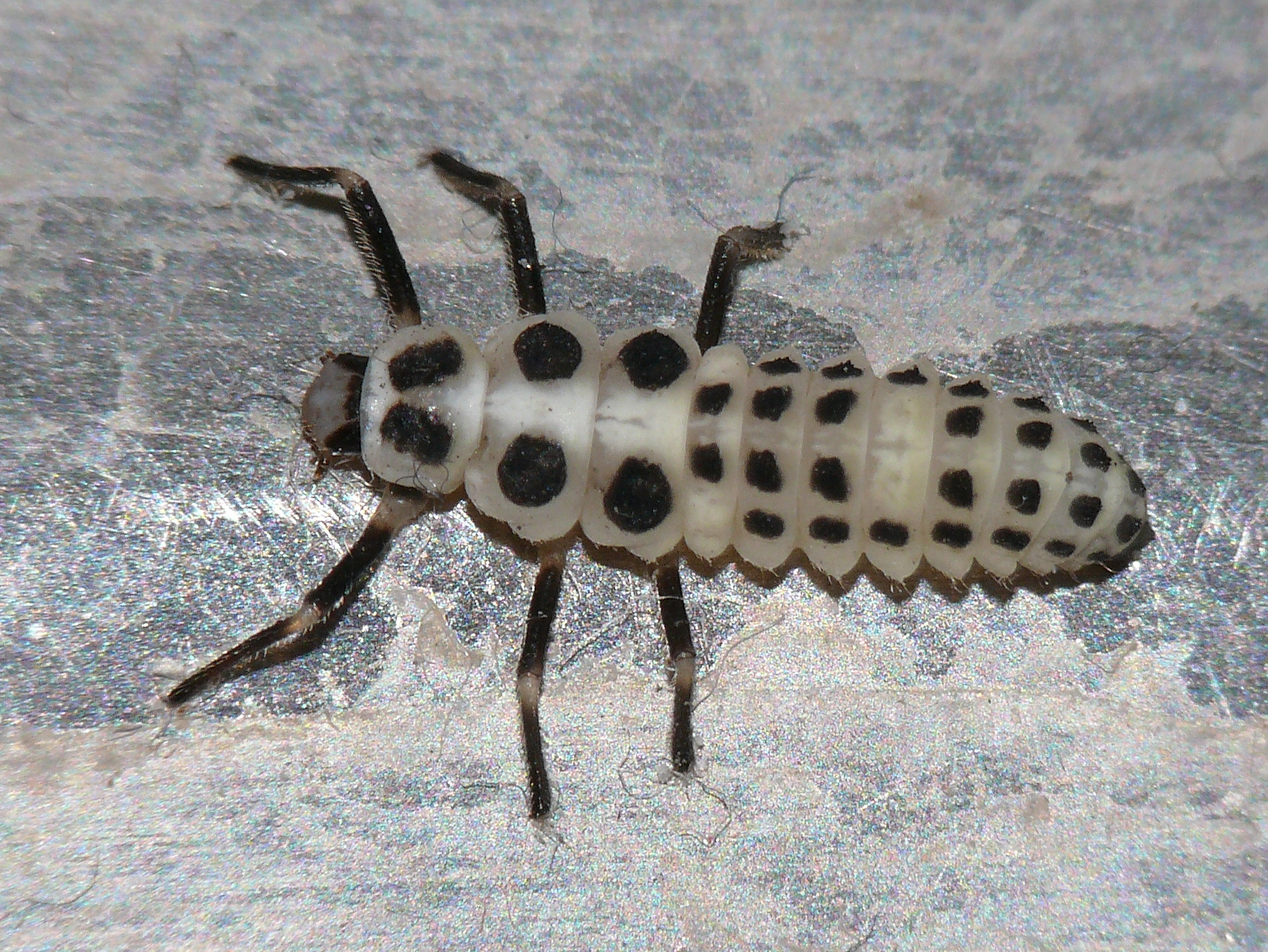 Calvia decemguttata, Larva, Coccinellidae, Hamburg, Germany